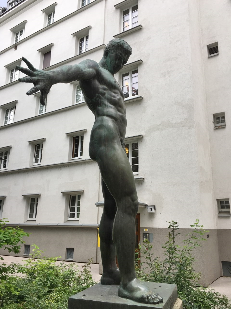 Statue "Nackter Jüngling" von karl Gelles, die Figur ist Ferdinand Hanusch gewidmet